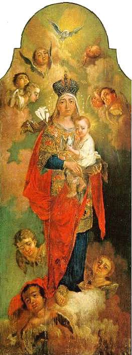 «Богоматір»